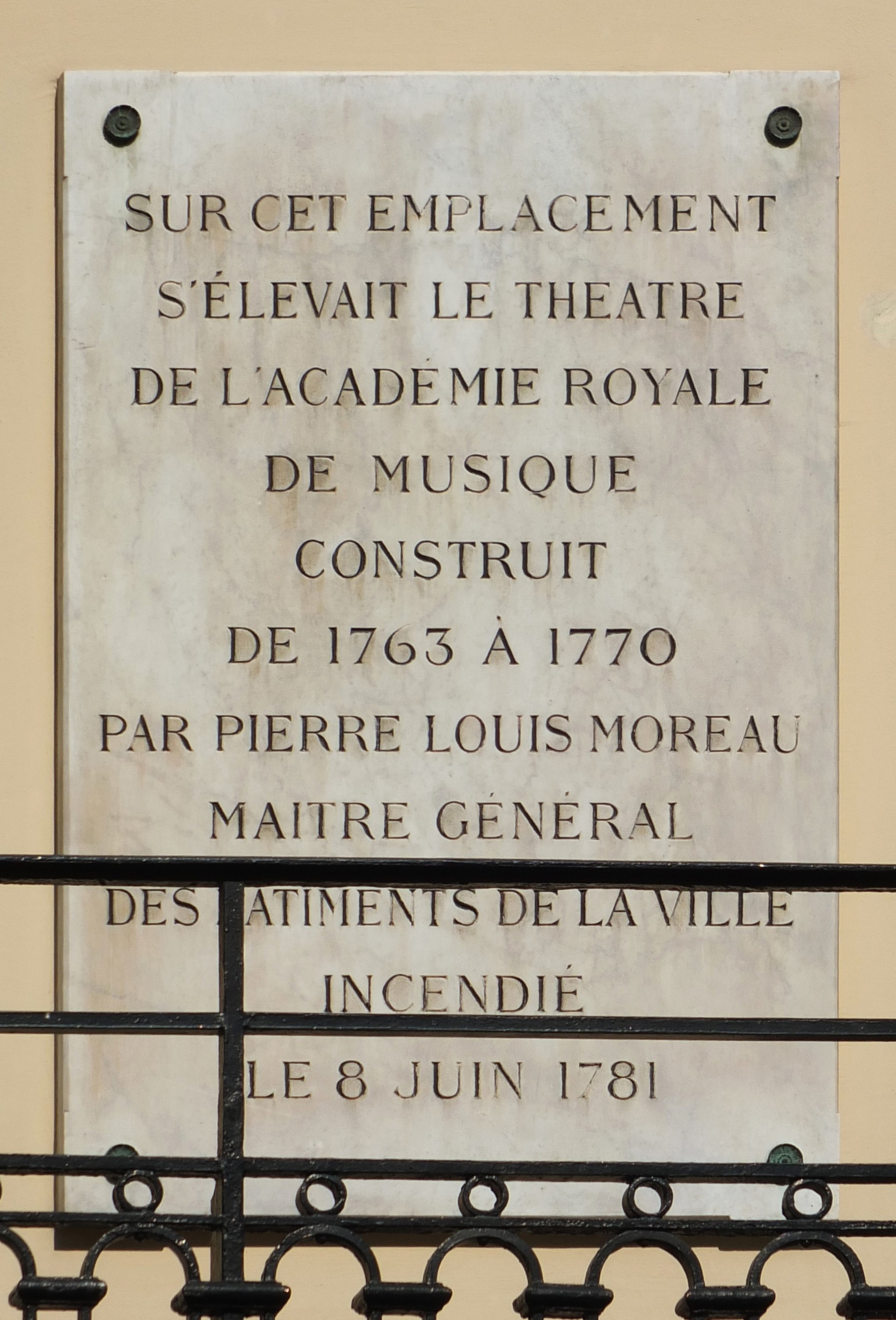 Plaque rue Saint-Honoré (Paris Ier arrond.) au coin de la rue de Valois.